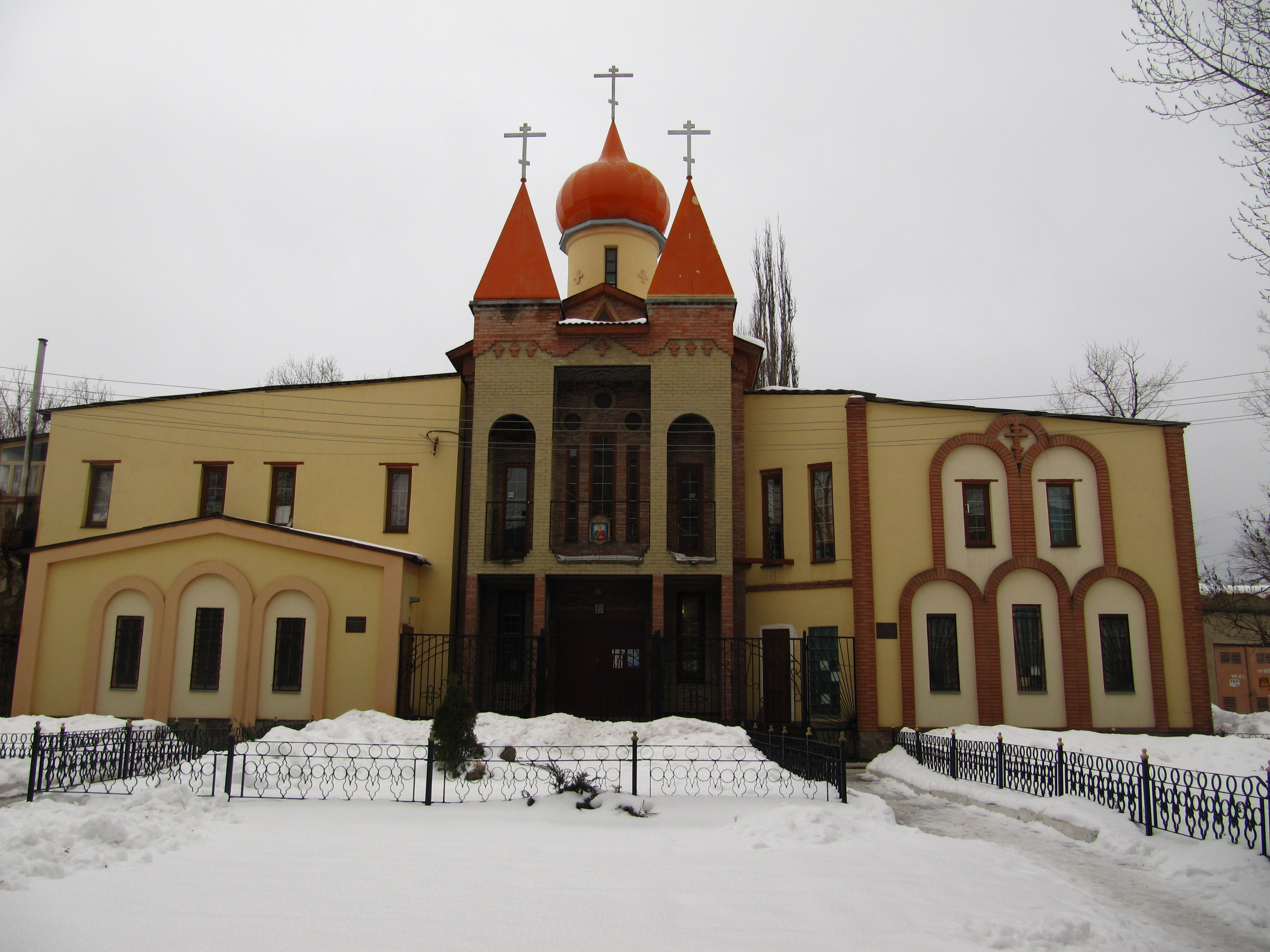 Церква св. Пантелеймона (МП) на території Луганського онкодиспансера. Споруджена за иніціятиви Юрія Єненка.